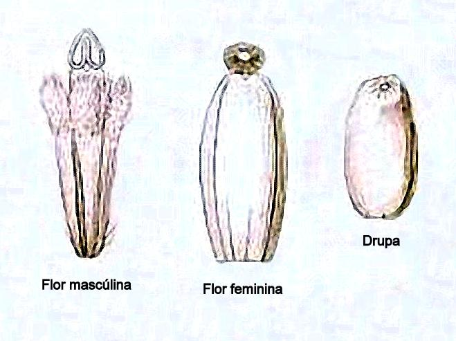 Coussapoa villosa :Flores y fruto (muy agrandado).